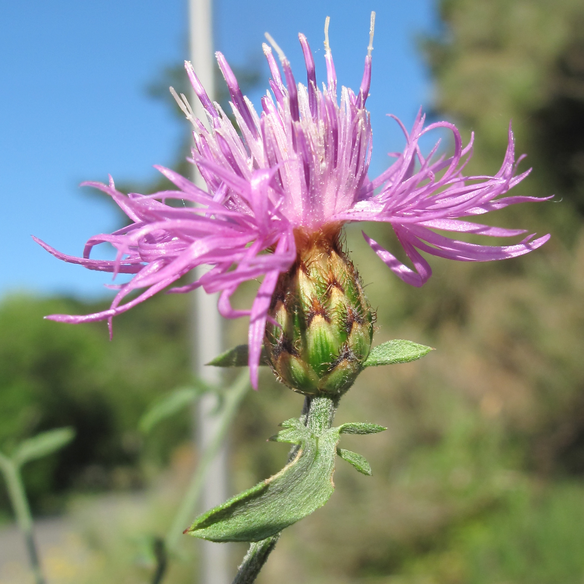 Centaurea paniculata (garmoncilla, escobillas) - Capítulo en plena antesis - Beauvezer (Departamento de los Alpes de Haute-Provence, Francia)